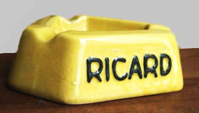 Cendrier publicitaire Ricard, Revol France, Saint-Uze